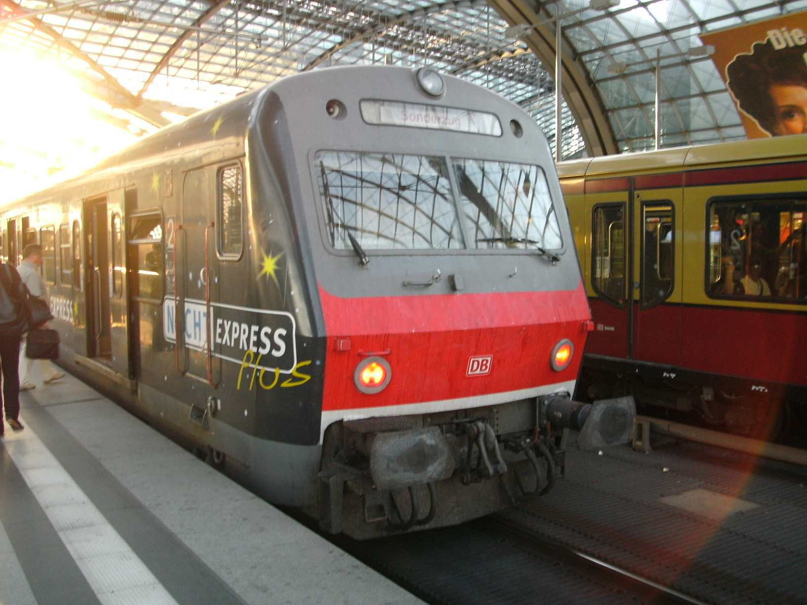 Ersatzzug aus x-Wagen in Berlin Hauptbahnhof während der S-Bahn-Überprüfung in Berlin